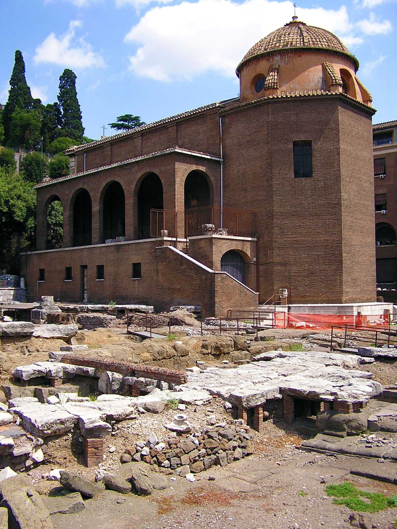 La chiesa di Sant'Omobono e l'area sacra.